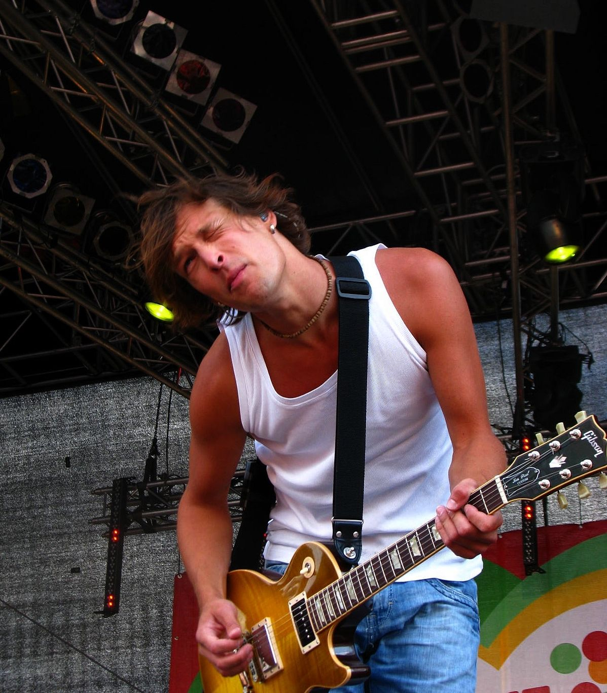 Riku Rajamaa.